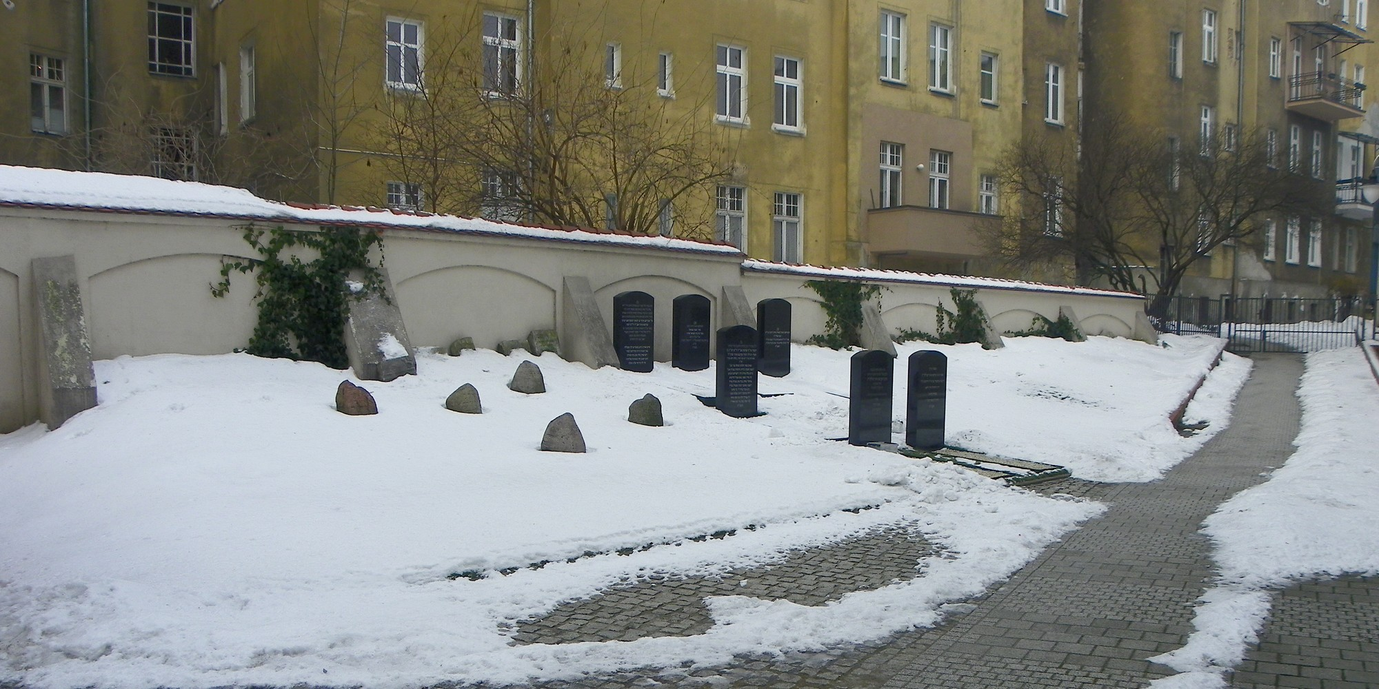 Symboliczne pozostałości po Cmentarzu Żydowskim przy ulicy Głogowskiej w Poznaniu.